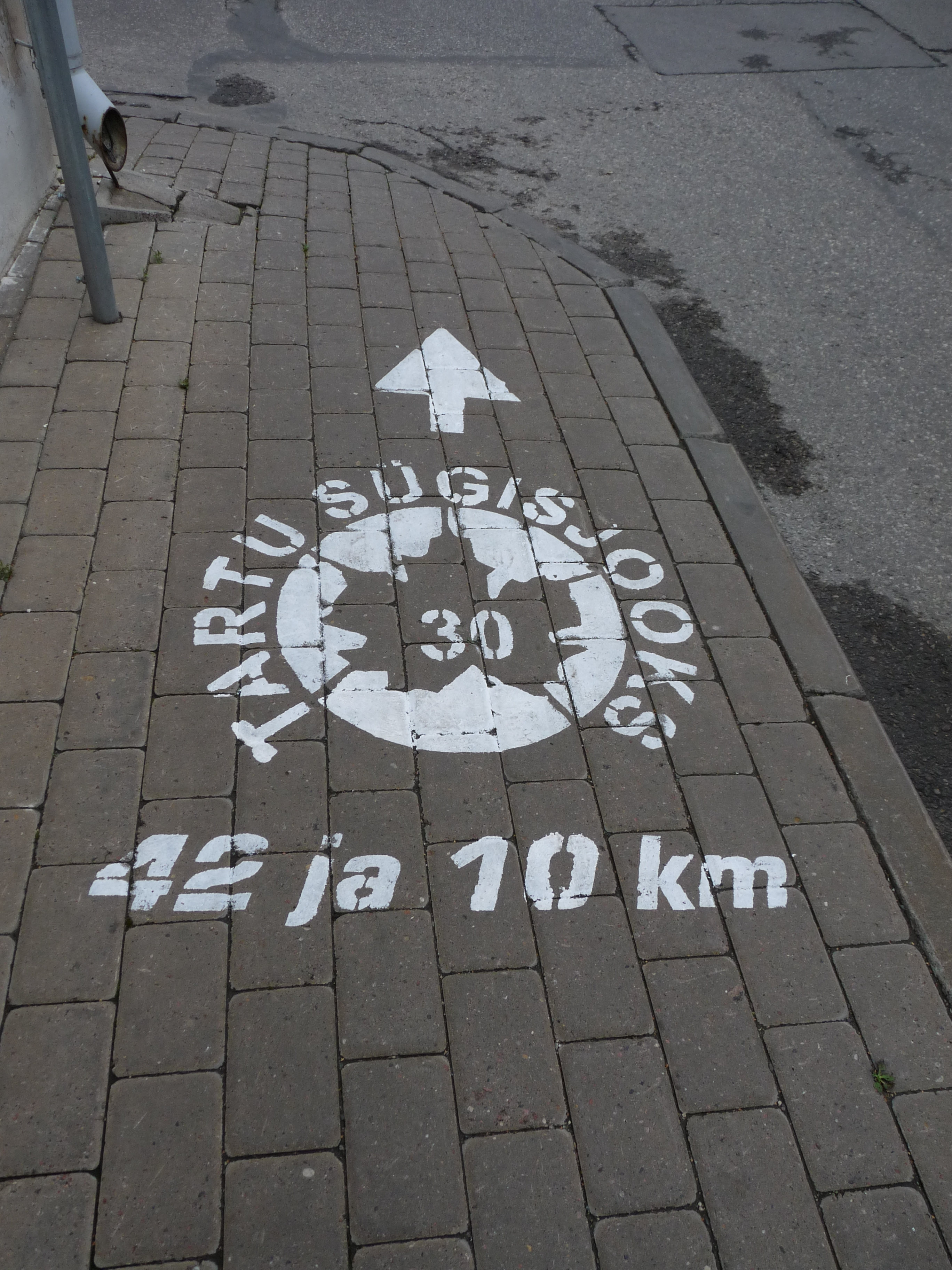 Tartu sügisjooksu marsruudi märgistus, 13. september 2012.